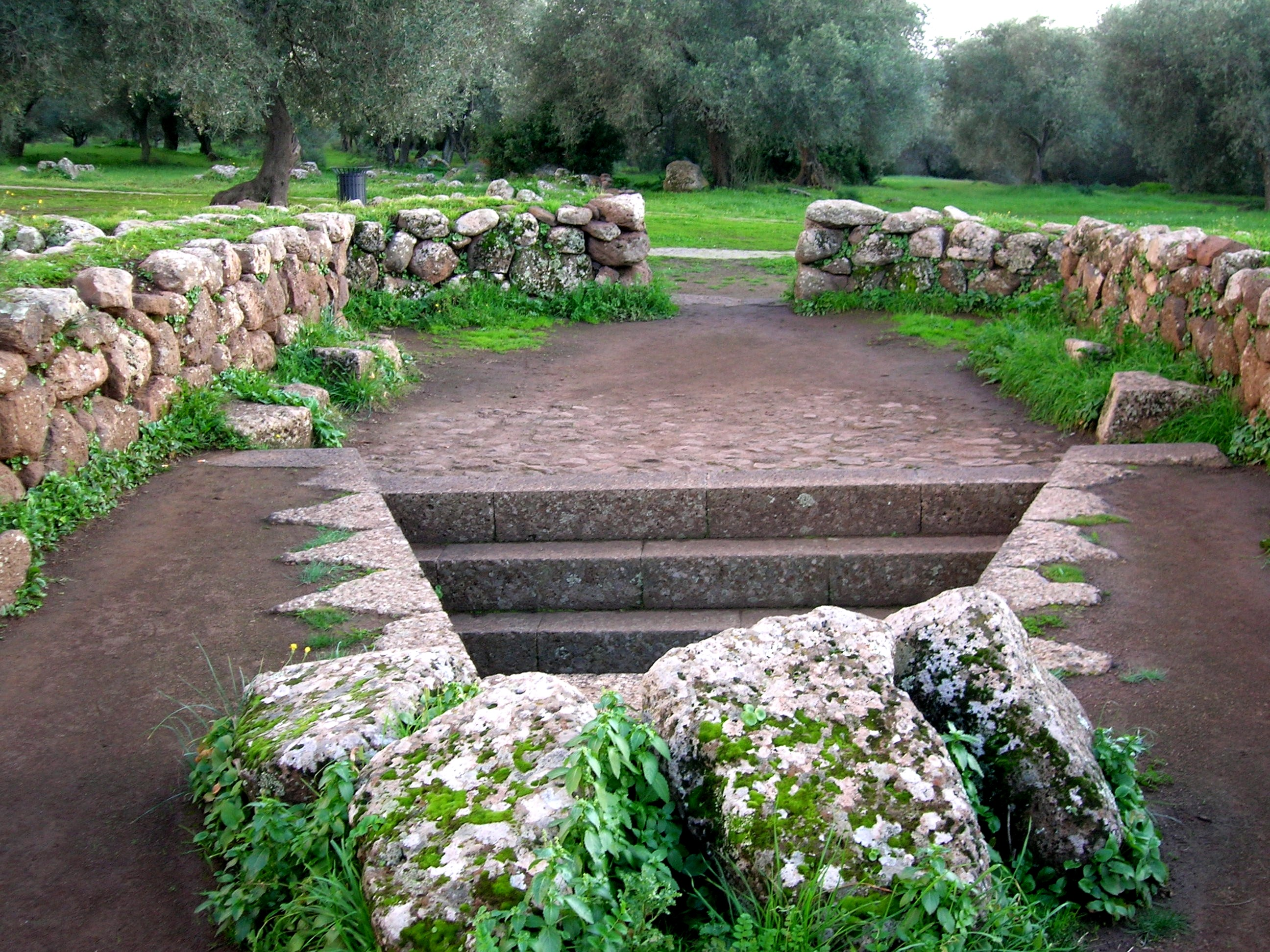 pozzo sacro di Santa Cristina (Oristano)